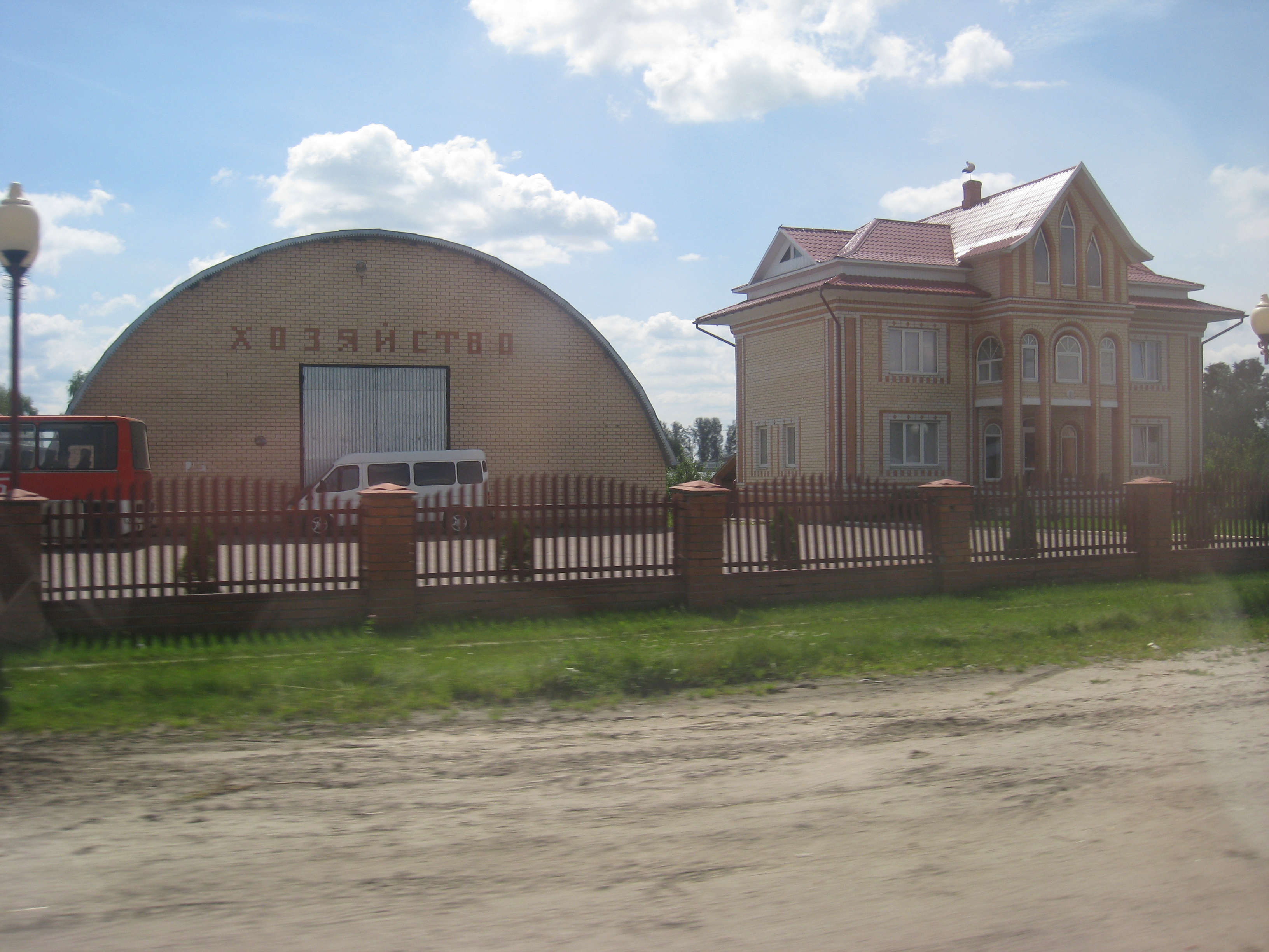 Альшаны (Столінскі раён). Фэрмэрская гаспадарка Брадок. Кіраваньне. Знаходзіцца на ўсходзе вёскі, на шашы Р88.